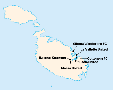 Répartition des clubs en First Division Maltaise 1919-1920.